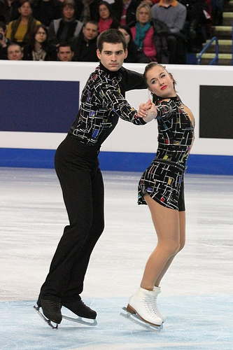 Александра Гербрикова и Руди Халмаэрт (Чехия) на чемпионате Европы по фигурному катанию 2012